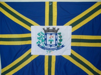 Bandeira do município paulista de Oscar Bressane, Brasil.